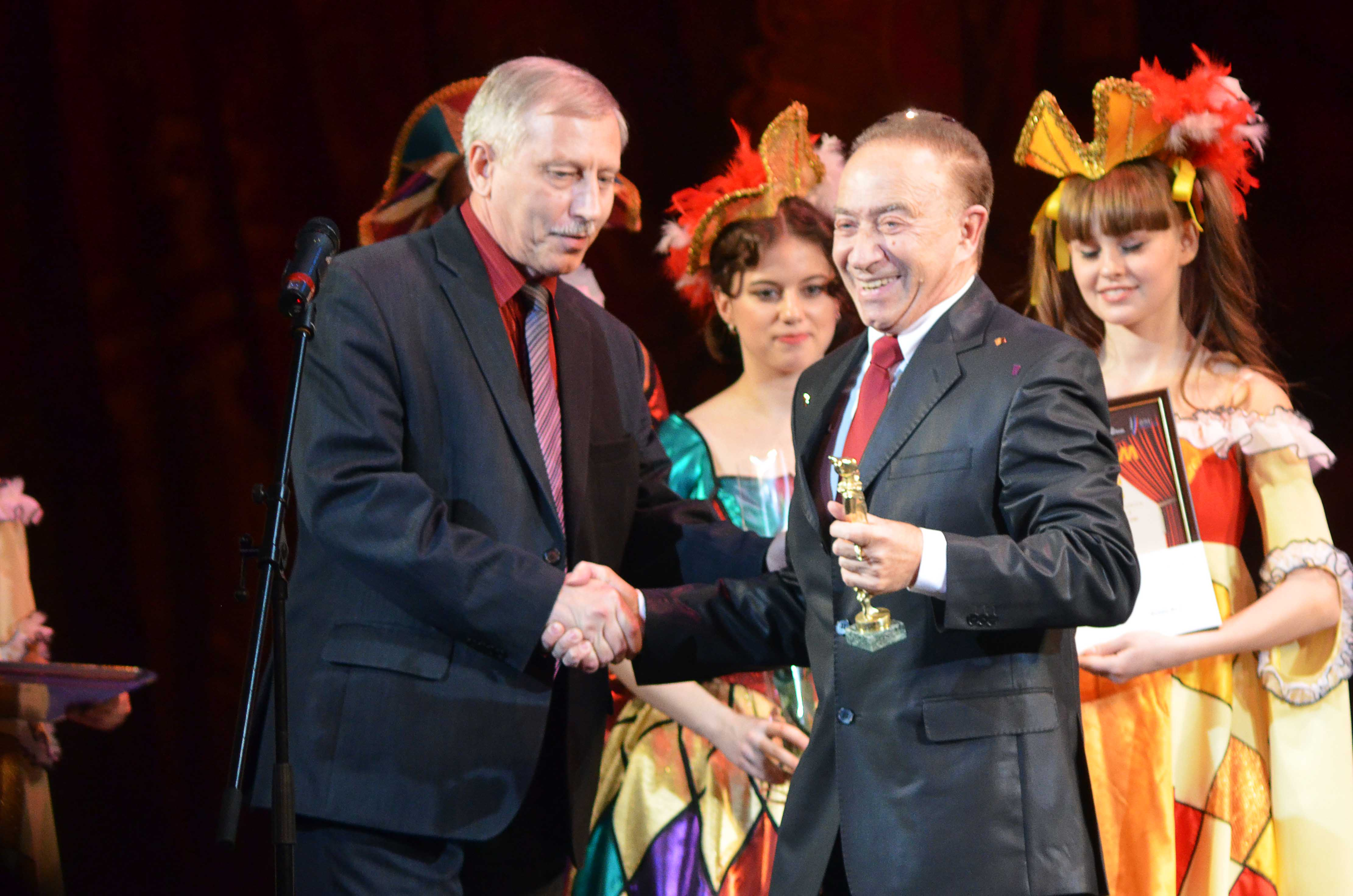 Юрий Кочнев на вручении "Золотого Арлекина" в 2014 году